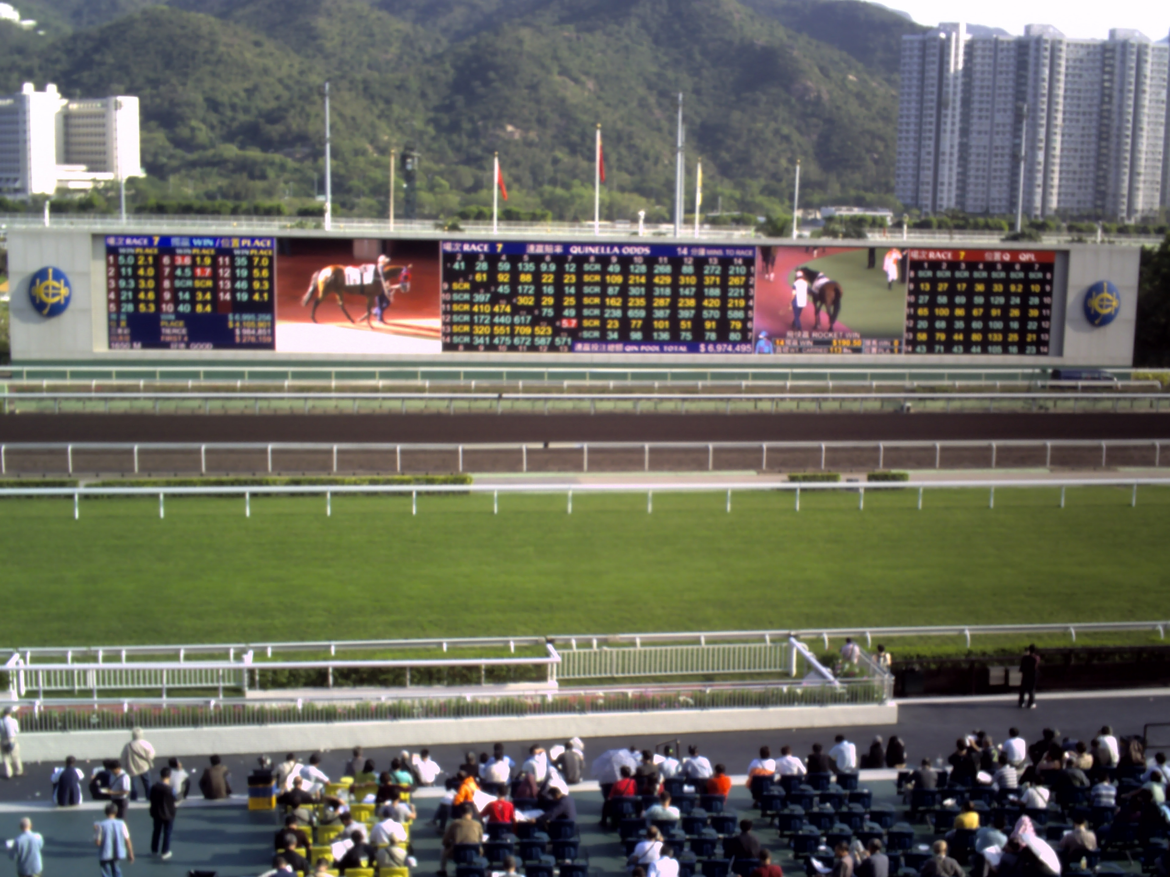 沙田馬場彩色大屏幕